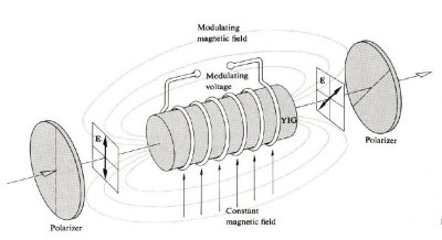 Cette image explique la mise en évidence de l'effet faraday. Le vecteur polarisation du champ électrique (flèche noir E). Champ magnétique généré par induction du passage d'un courant dans un fils.